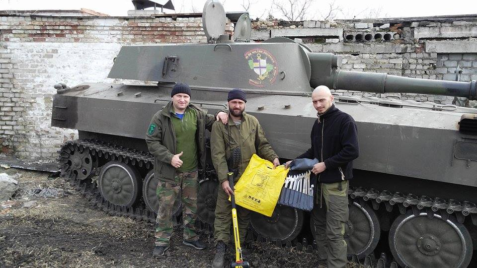 Десь в секторі "М" "Миротворці" передають допомогу військовим